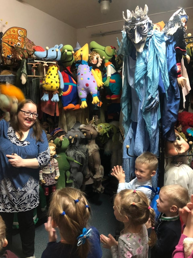 За кулисами.Театр кукол Республики Карелия. Петрозаводск.